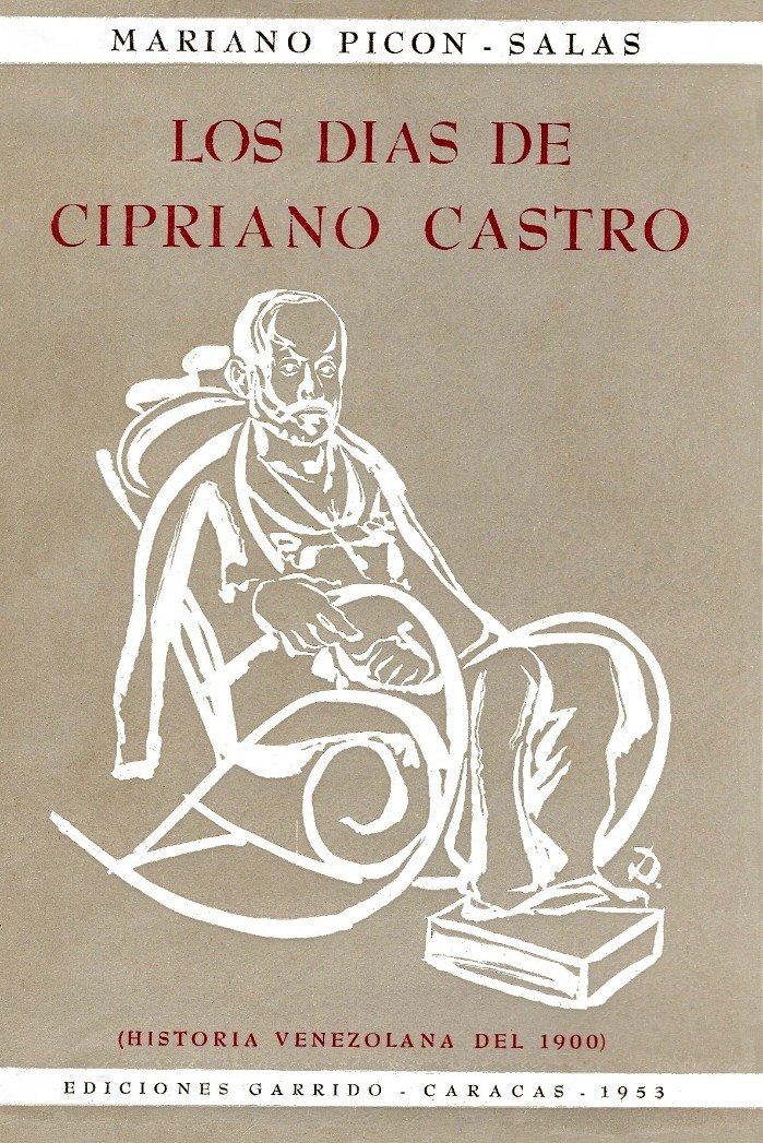 Portada de la primera edición del libro Los días de Cipriano Castro, del escritor venezolano Mariano Picón Salas.